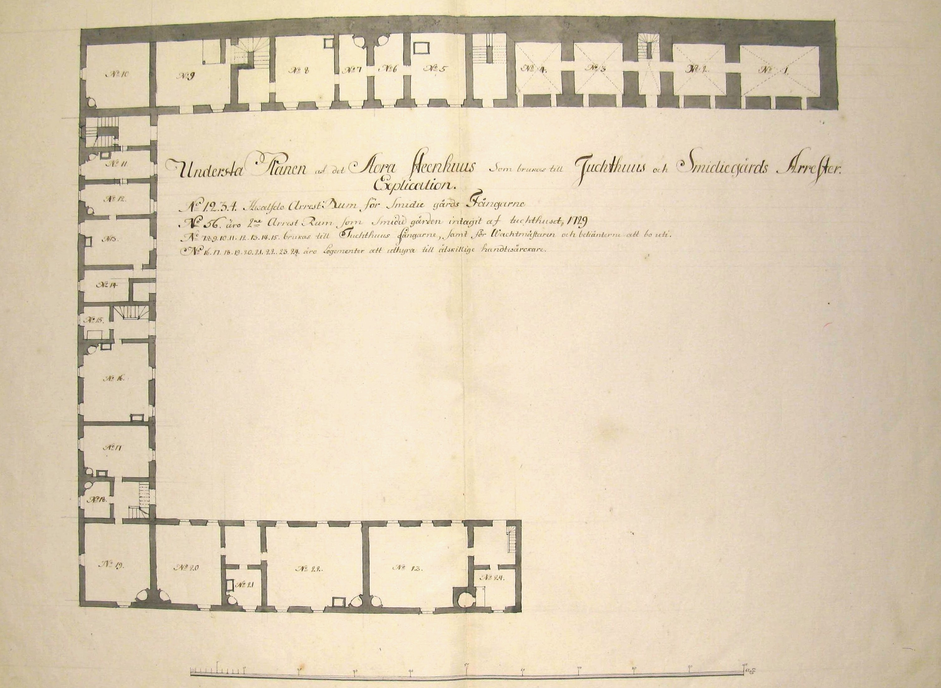 planritning över Smedjegården. 1-4 är arrestrum